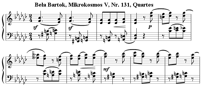 Auszug aus Bela Bartoks Mikrokosmos V, Nr. 131, Quarten